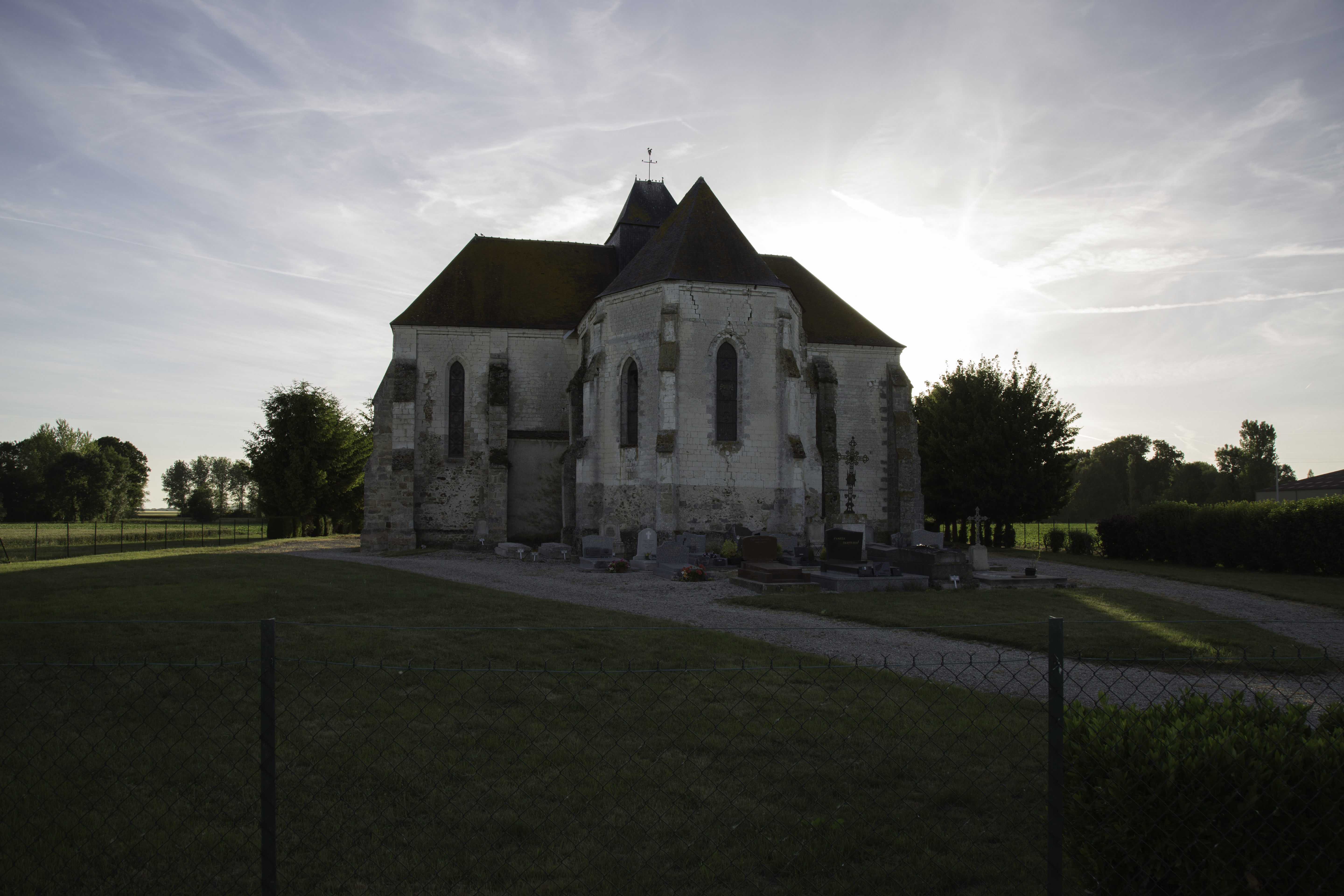 Église Saint-Pierre de La Chapelle-Lasson .